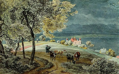 Wilhelm von Kobell (1766–1853): Gewitter über Schloss Ammerland, 1798. Ein Hirte mit wehendem Mantel treibt seine Herde nach Hause. Im Hintergrund der Starnberger See, die Hügel am jenseitigen Ufer und die bayerischen Alpen. Aquarell über Feder, 9 x 15 cm. Signiert und datiert. Vgl. WV 237 (19 x 24 cm, "um 1794").